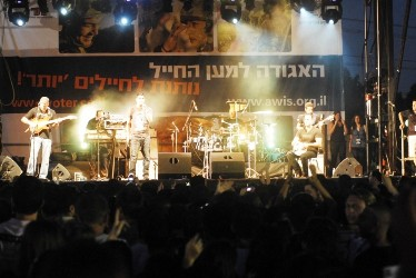 festival